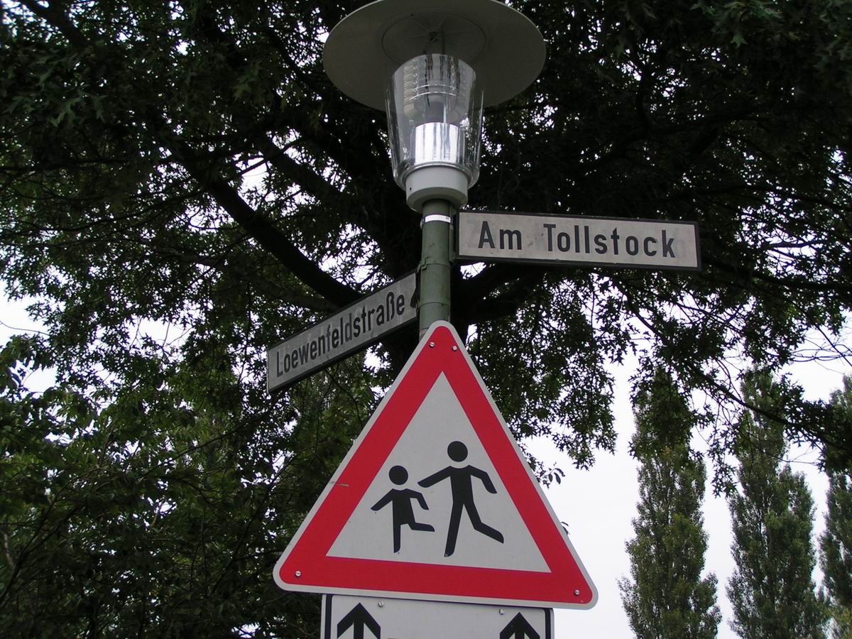 Loewenfeldstraße in Bottrop-Kirchhellen, benannt nach dem Freikorpskämpfer Loewenfeld